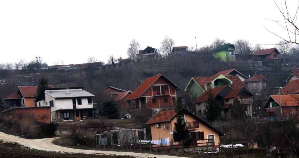 Село Буковче код Јагодине